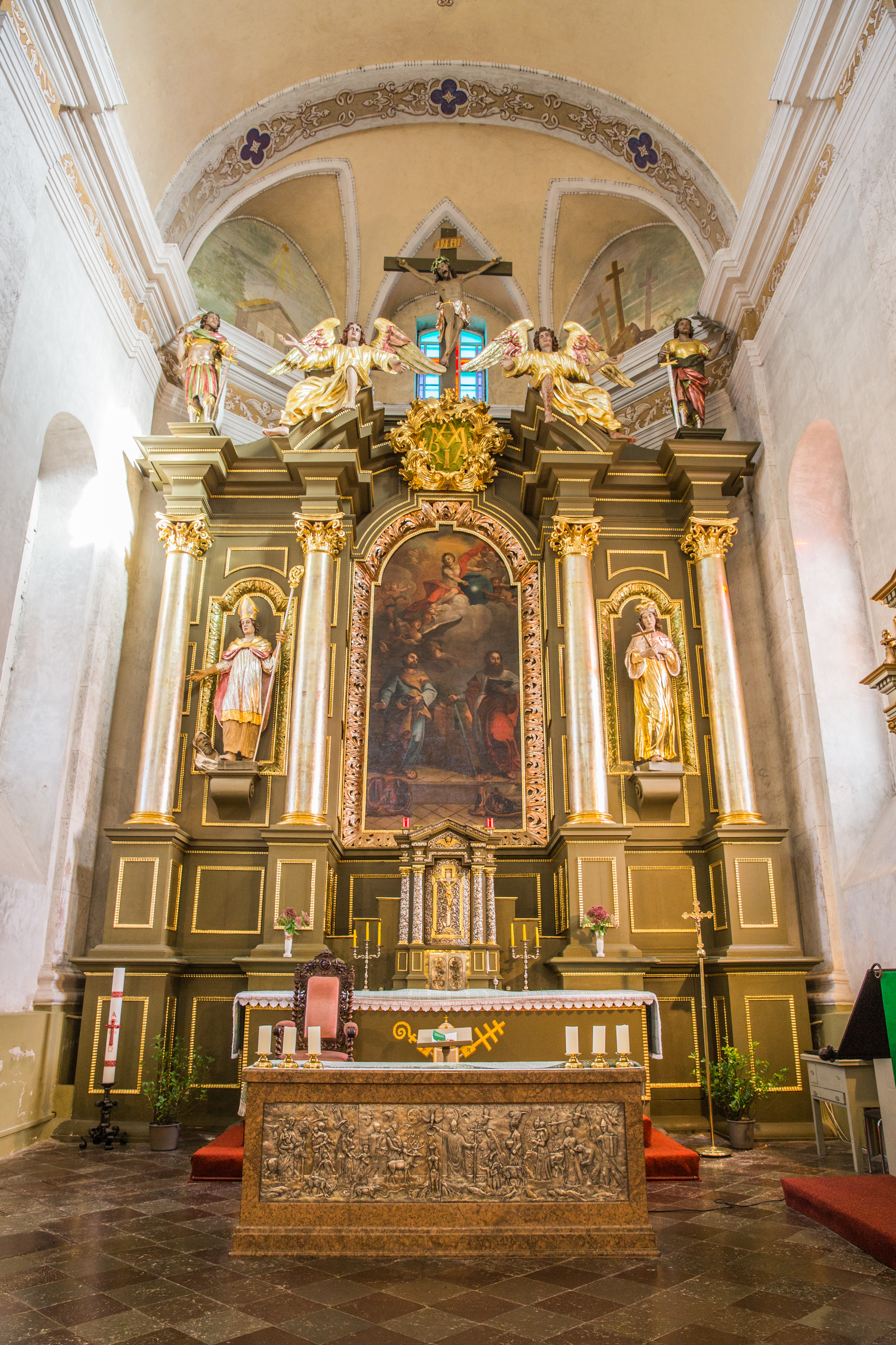 Varnių Šv. apaštalų Petro ir Pauliaus bažnyčia 2